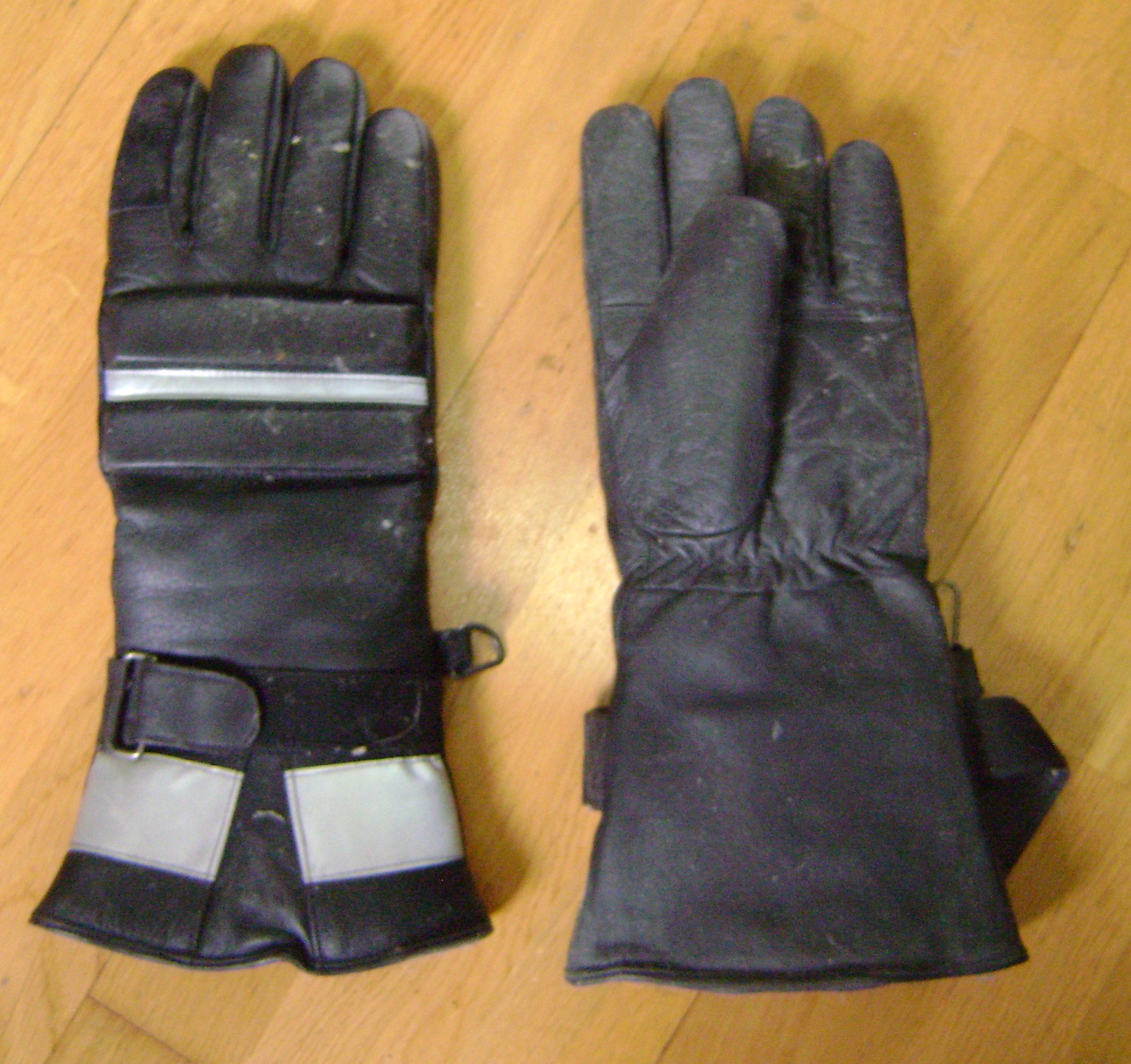 Motorradhanschuhe Armee